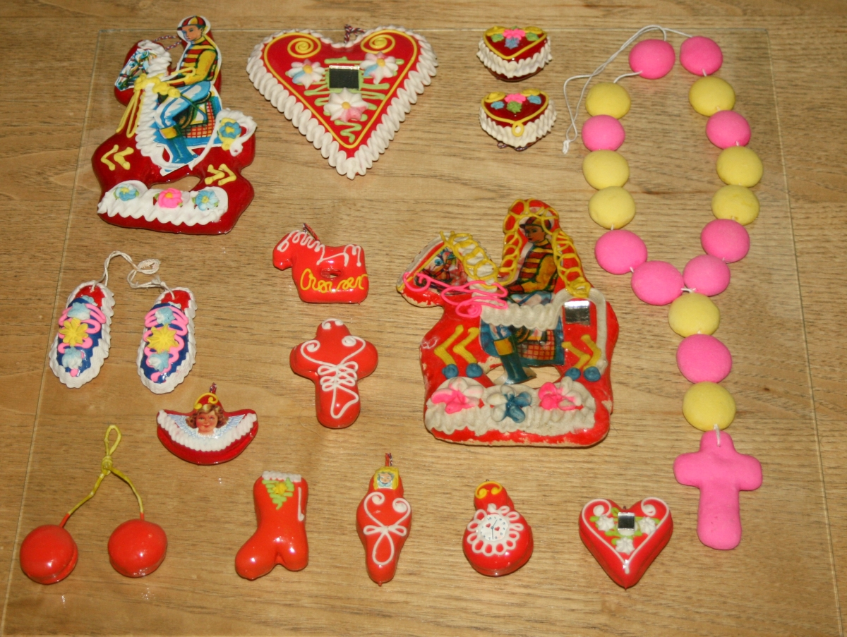 snimljeno tijekom Noći muzeja u Etnografskom muzeju u Zagrebu